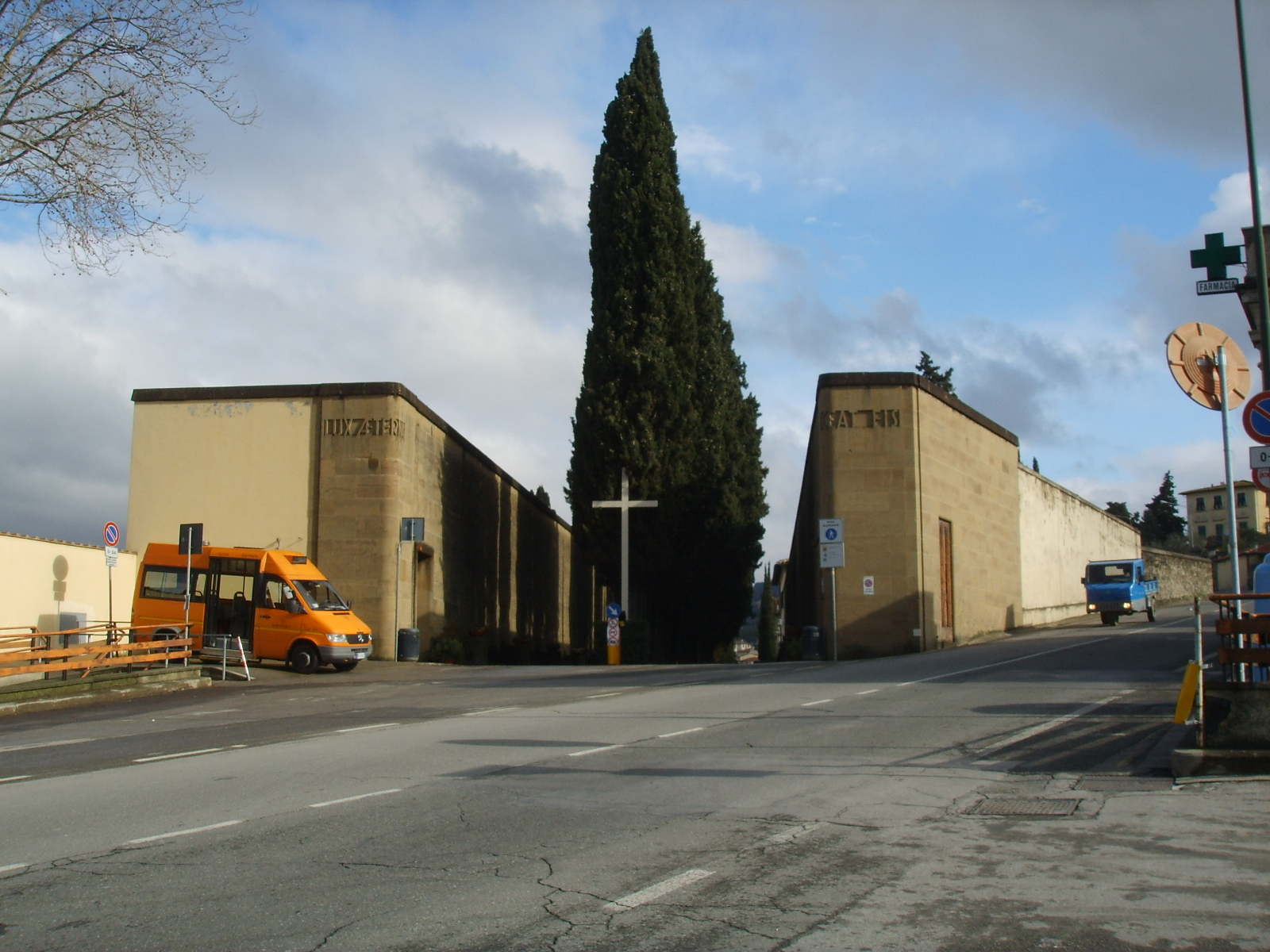 Cimitero di trespiano